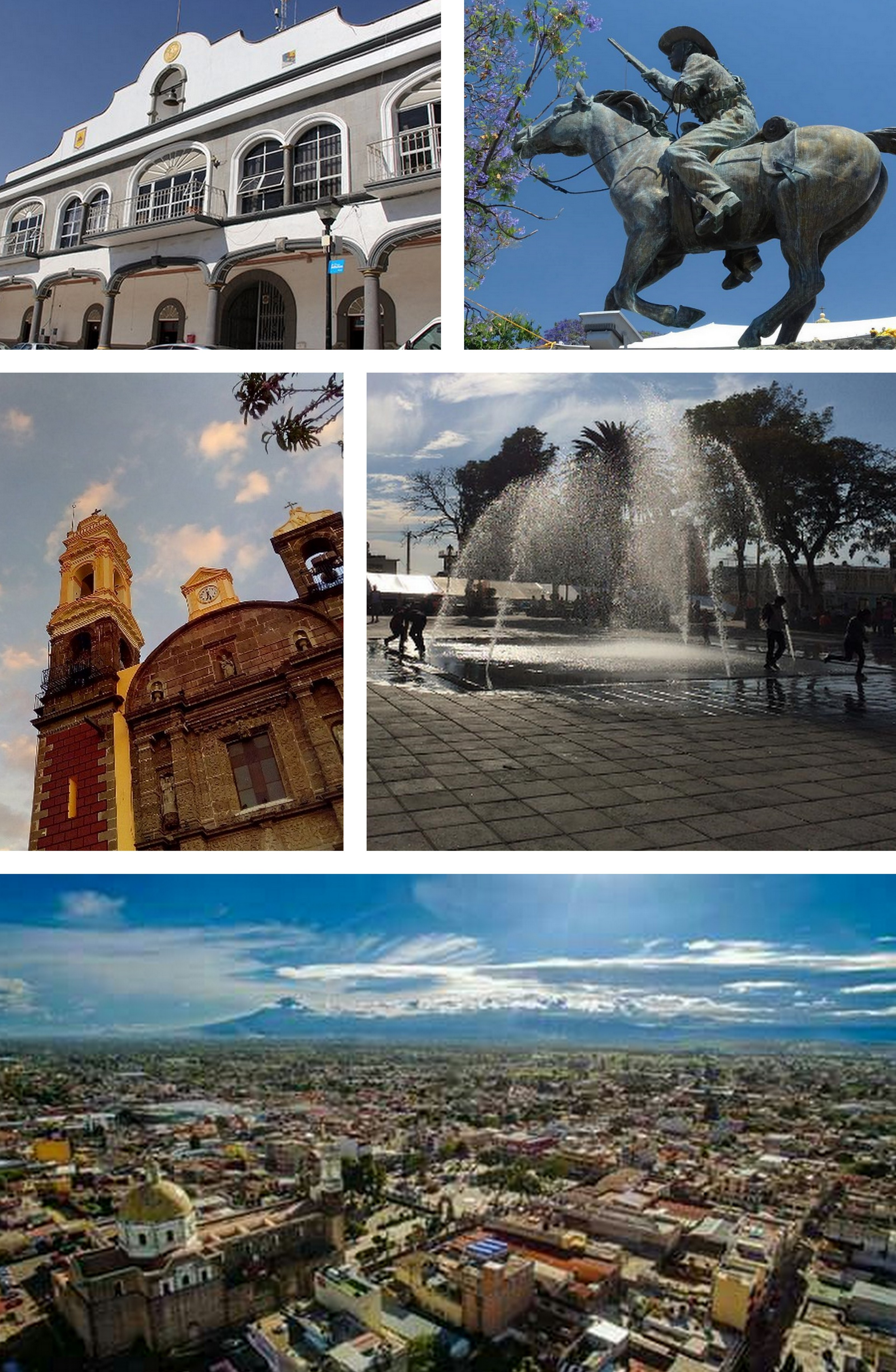 Montaje creado a partir de cinco imágenes en Wikimedia Commons: File:Monumento a Domingo Arenas.jpg File:Zacatelco Skyline.jpg File:Ayuntamiento de Zacatelco.jpg File:Parroquia de Zacatelco.jpg File:Parque central Zacatelco.jpg